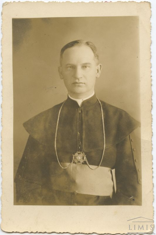 Pranciškus Ramanauskas (1893 m. lapkričio 21 d. Kudoniuose, Betygalos valsčius – 1959 m. spalio 15 d. Telšiuose) – Telšių vyskupas, teologijos mokslų daktaras, profesorius, kankinys, spaudos darbuotojas.